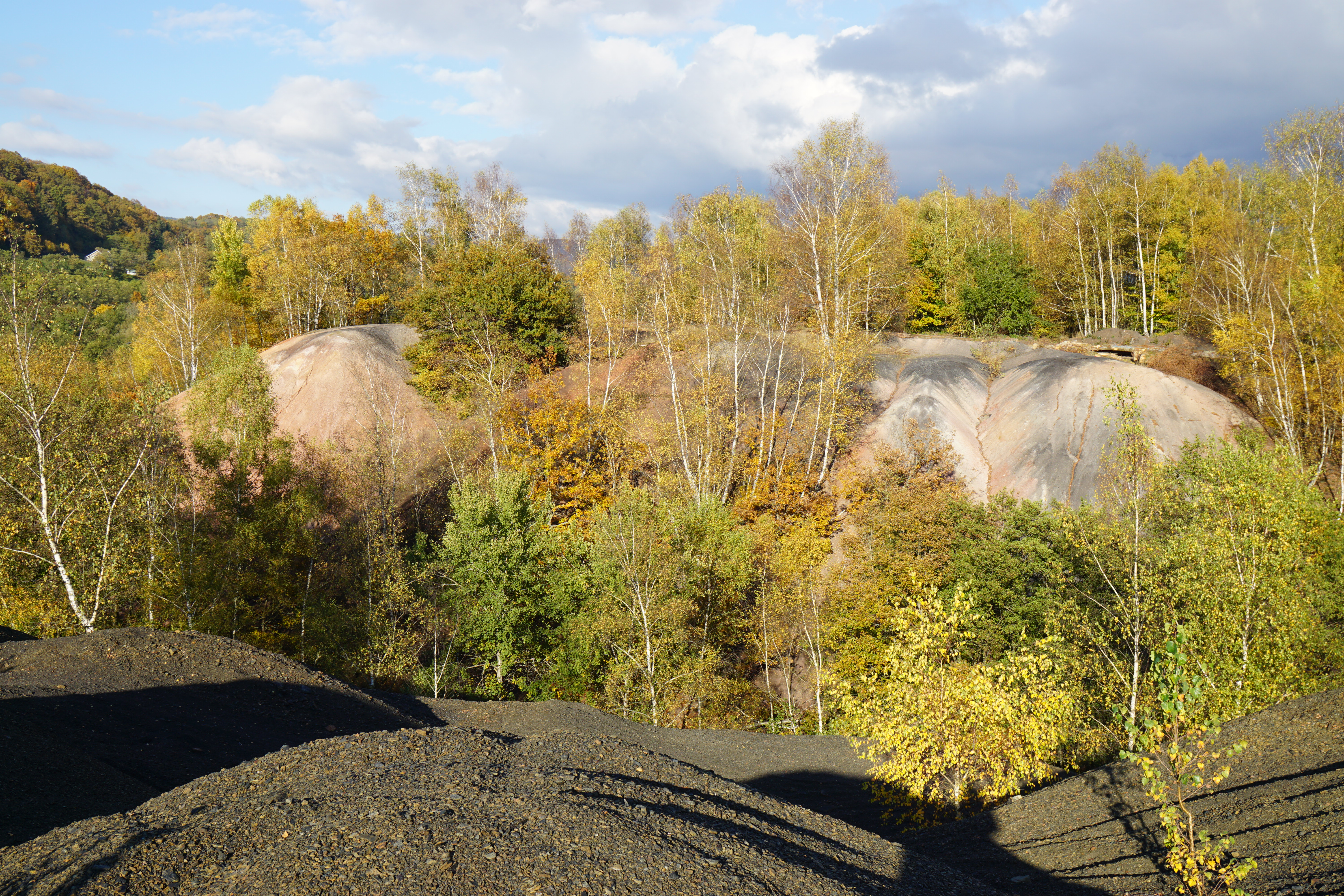 Le terril rouge (couleur dû à la combustion) de Ronchamp vu depuis le terril noir de Magny-Danigon exploité dans la plaine du Chanois.